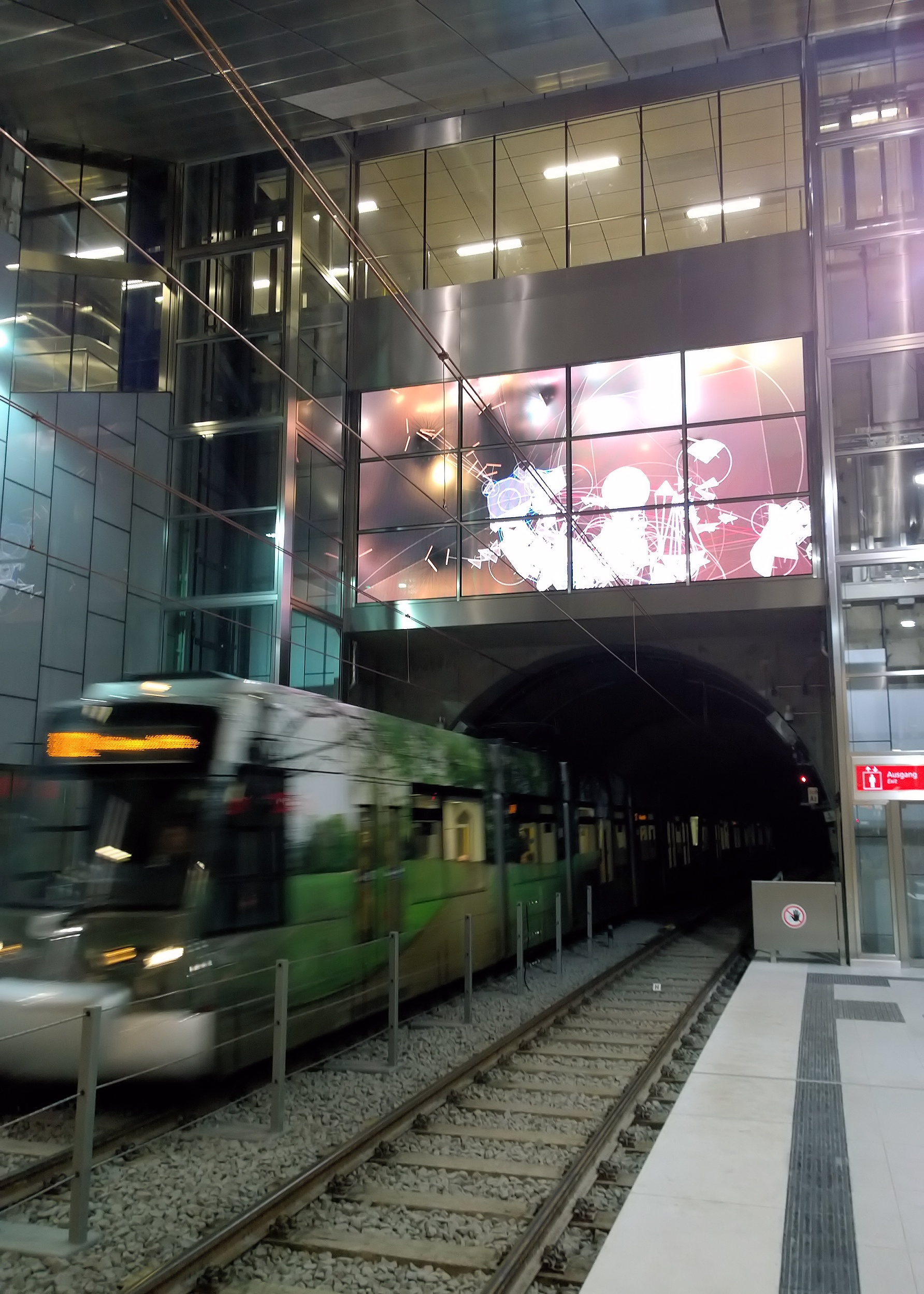 Einer der sechs neuen U-Bahnhöfe: Schadowstraße